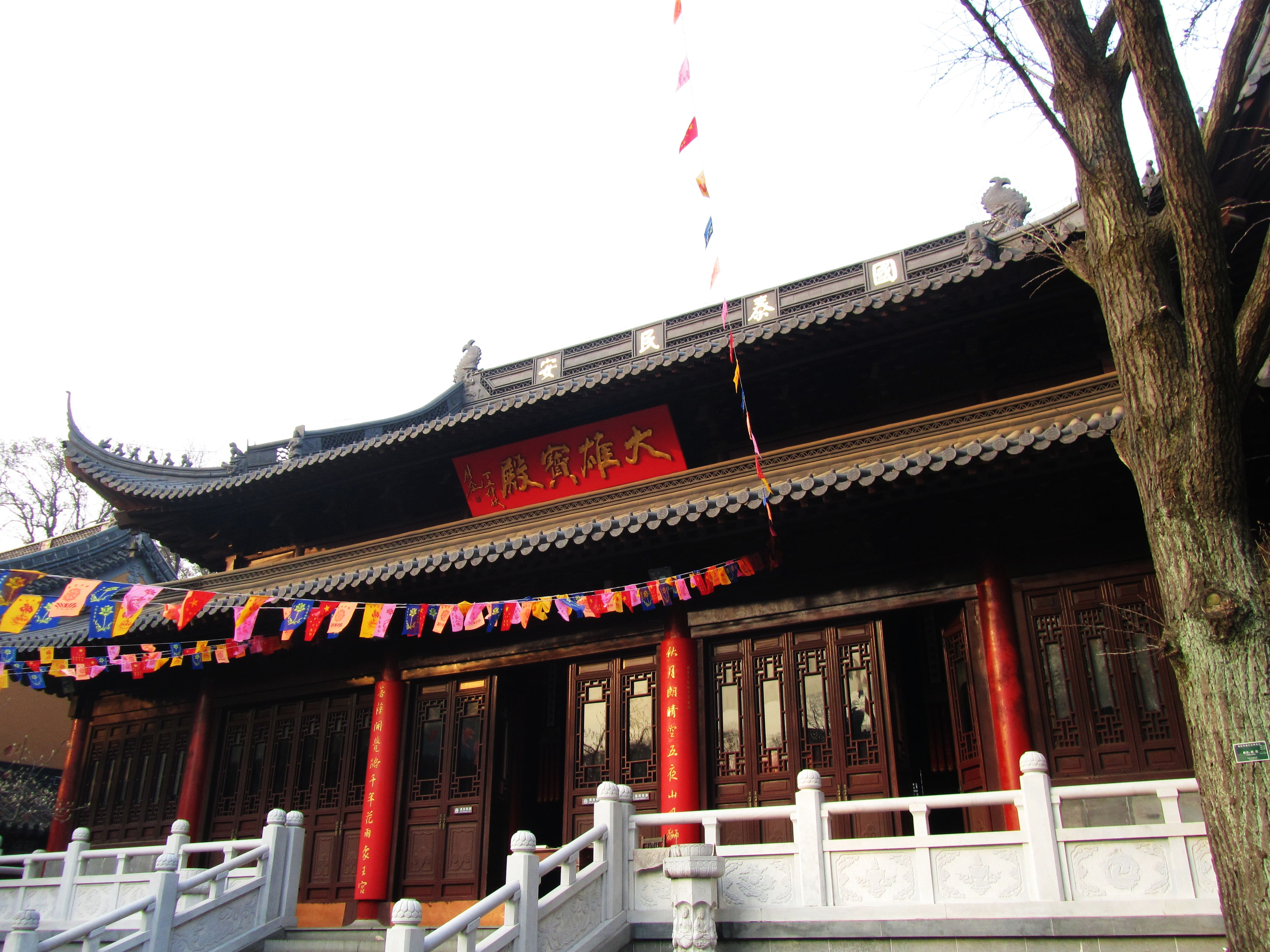 今日的南京灵谷寺大雄宝殿。